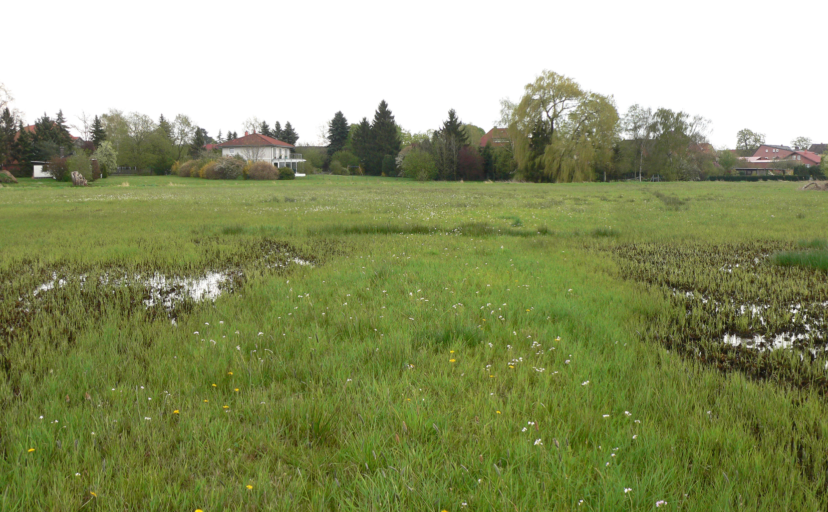 Leicht erhöhter Weg, der auf ein neuzeitliches Viehgehege aus der Mitte des 16. Jahrhunderts zuführt, kurz vor den Büschen verläuft die Fuhse